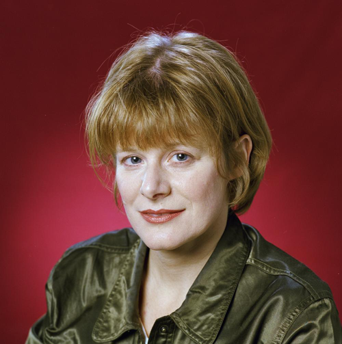 Jeanet Schuurman.